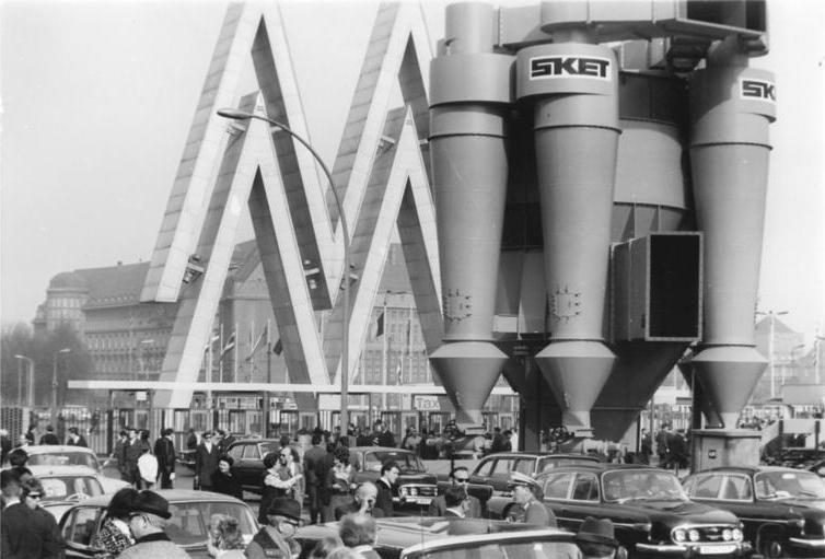 Leipzig, Frühjahrsmesse, Freigelände, Umluftsichter Zentralbild Gahlbeck 21.3.71 Leipziger Frühjahrsmesse 1971. Bis zum letzten Tag herrscht reges Treiben auf dem Messegelände. Im Vordergrund ein Umluftsichter vom SKET (VEB Schwermaschinenbau-Kombinat "Ernst Thälmann", Magdeburg), der in seiner Form an eine Mondrakete erinnert.